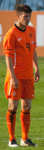 Klaas-Jan Huntelaar & Dirk Kuyt